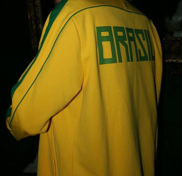 Chaqueta oficial de la Selección brasileña de fútbol. La tipografía de "Brasil" está claramente inspirada en la pixação.